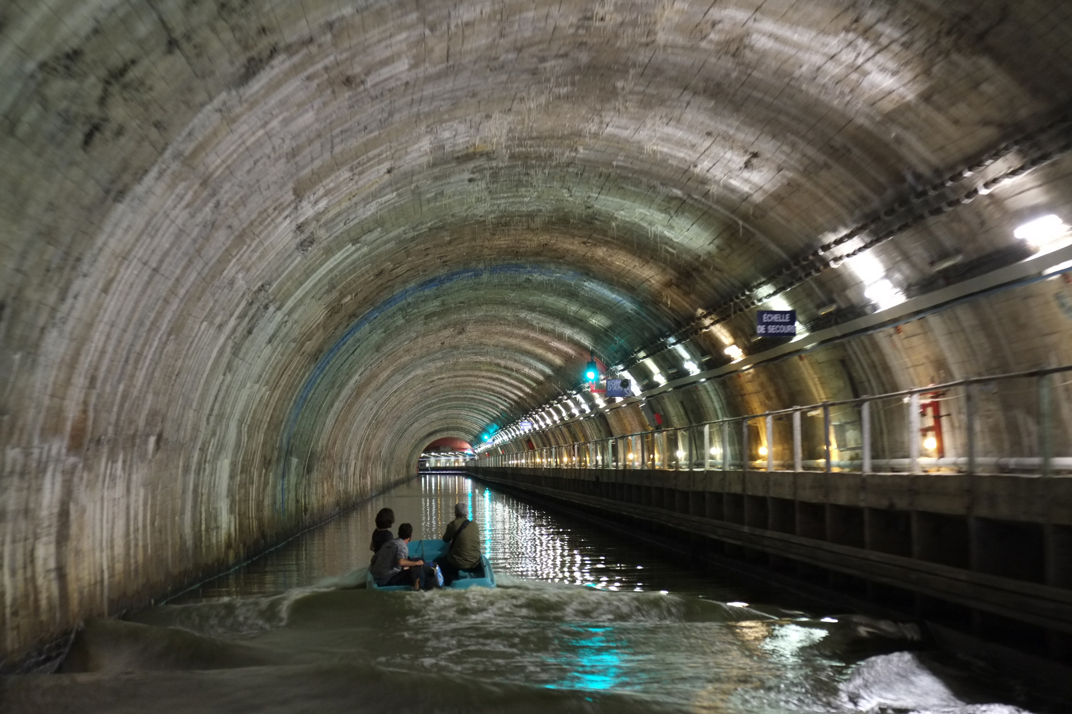 Tunnel du canal Saint-Félix Nantes Loire-Atlantique France